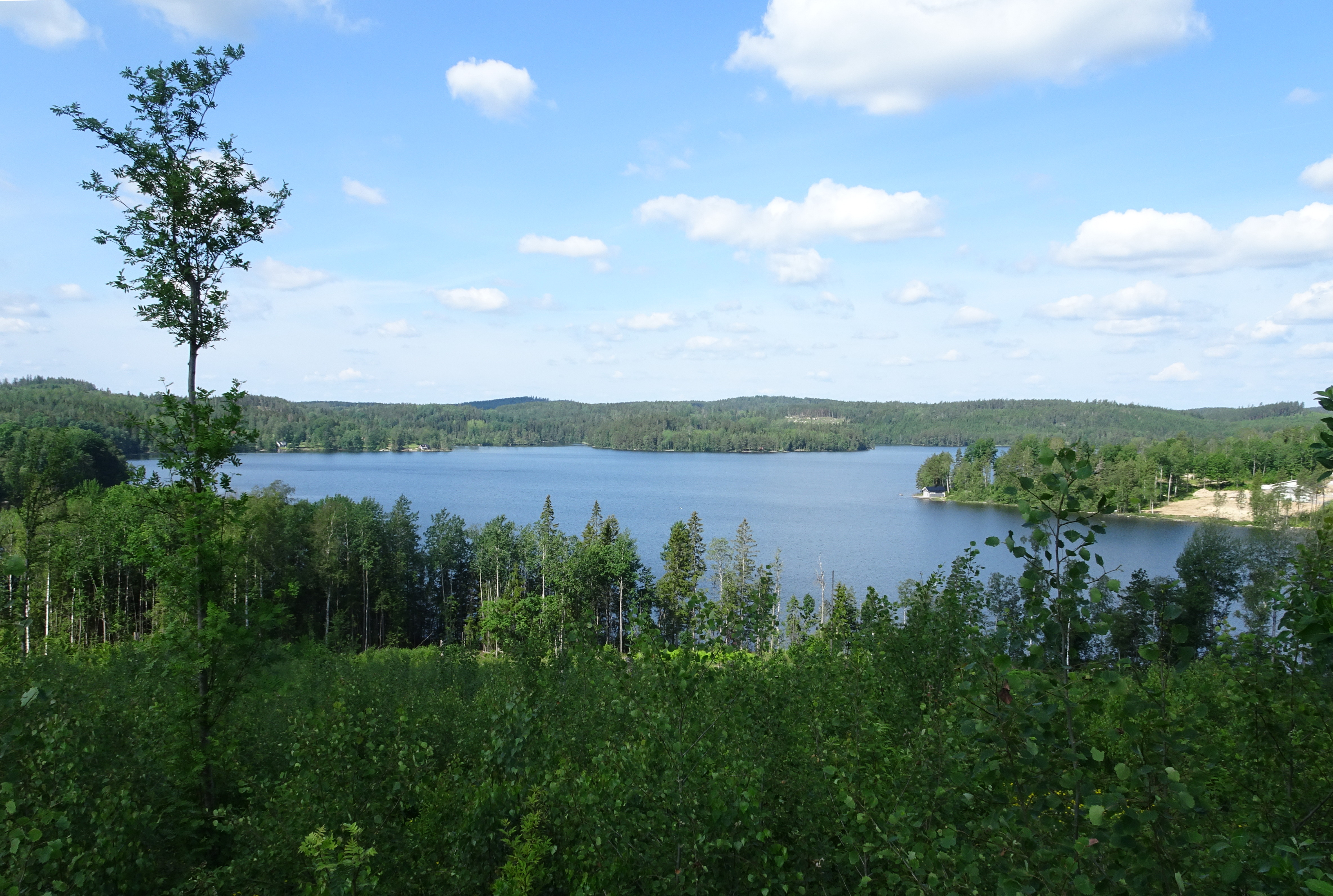 Sjön Gissen, vy mot norr